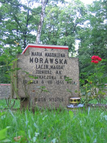 Magdalena Morawska's gravestone (Powązki Cemetery; Cmentarz Komunalny, d. Wojskowy)